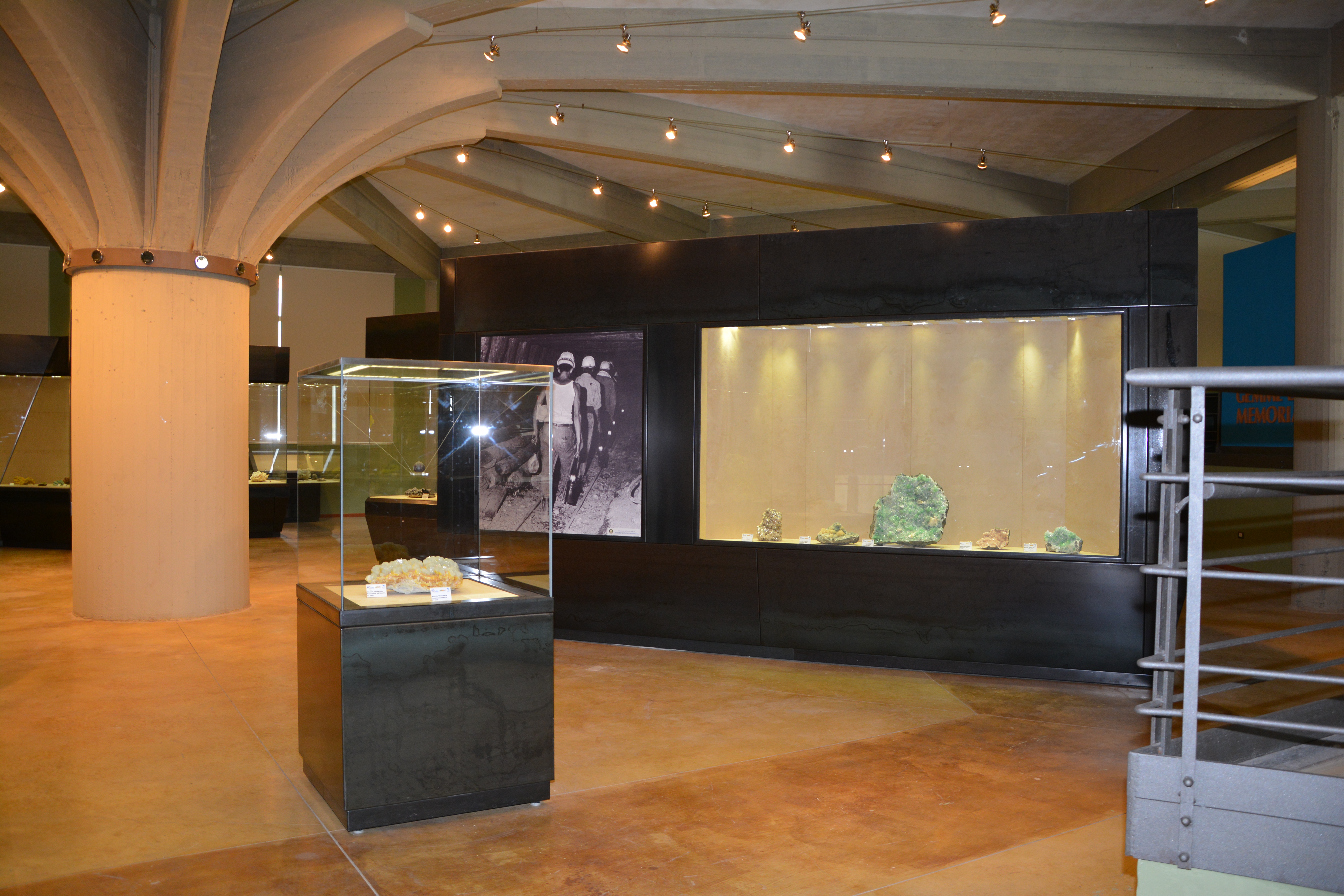 Vista di ambienti museali posti al piano terra del Museo mineralogico di Caltanissetta